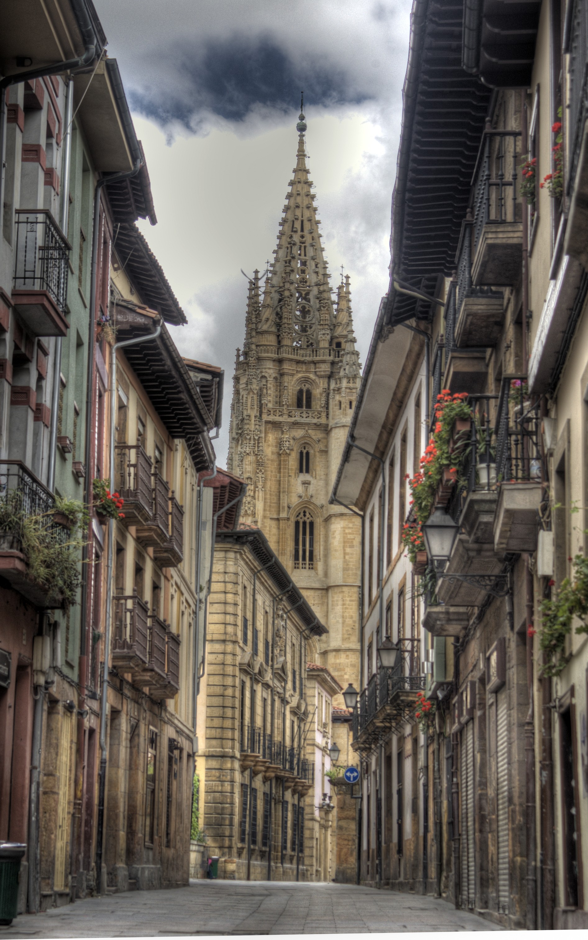 Catedral de Oviedo desde la calle Mon